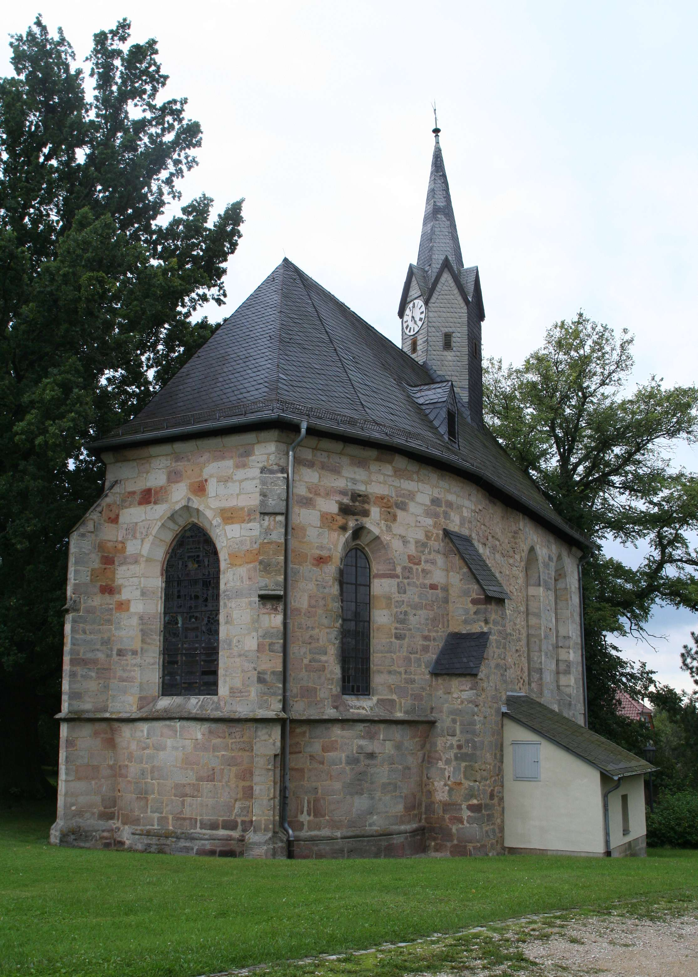 ev. Kirche Mönchröden evangelische Christuskirche in Mönchröden, OT Rödentals, Landkreis Coburg